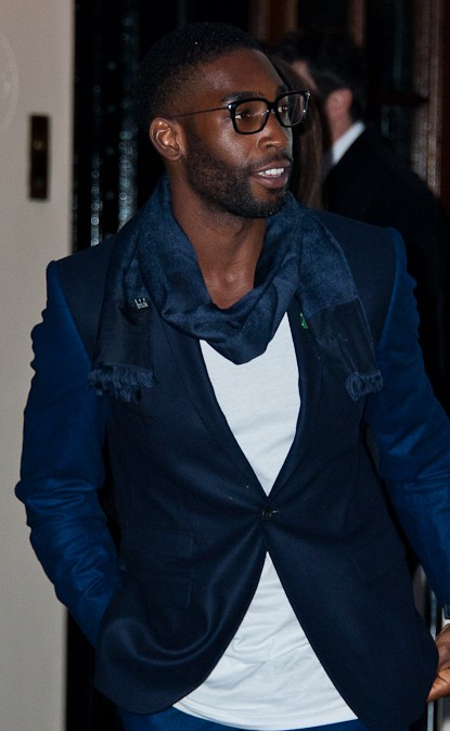 Fendi store opening - Tinie Tempah